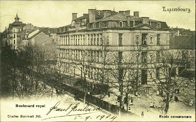 Ancienne école primaire "Aldringen" (ville de Luxembourg), construite en 1881 par Antoine Luja